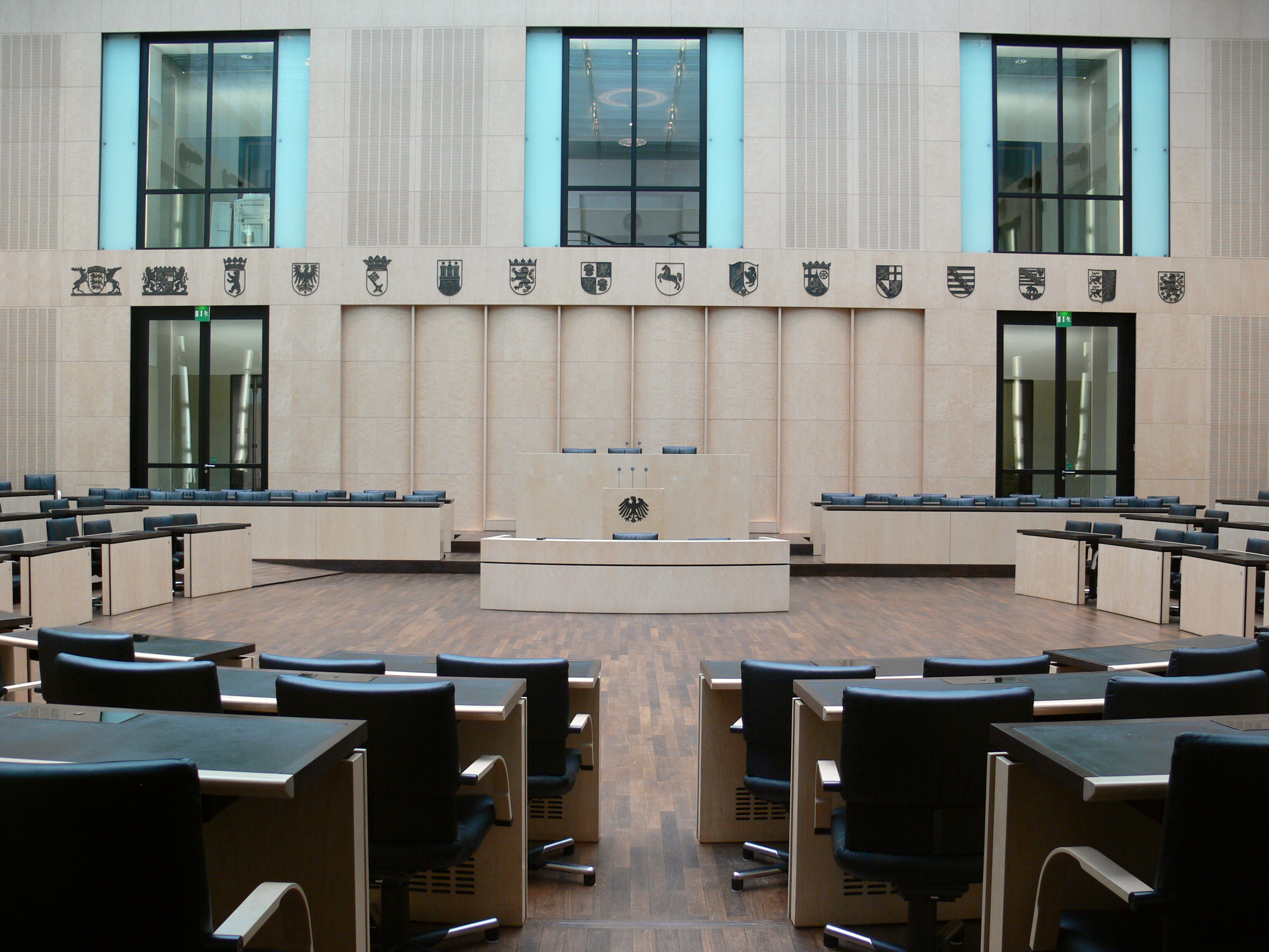 Plenarsaal des Deutschen Bundesrats. Ehemaliges Preußisches Herrenhaus; Sitz des Bundesrats der Bundesrepublik Deutschland; Leipziger Straße, Berlin